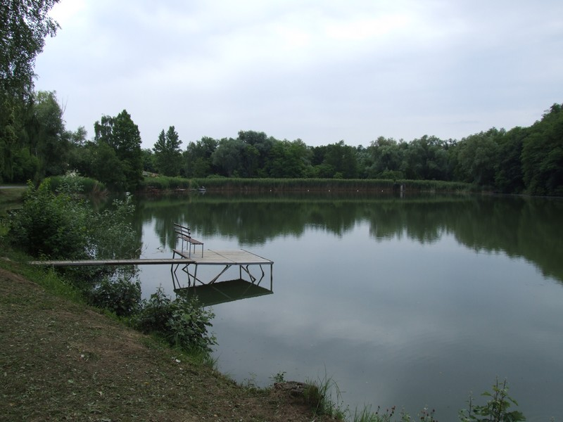 A galamboki horgásztó